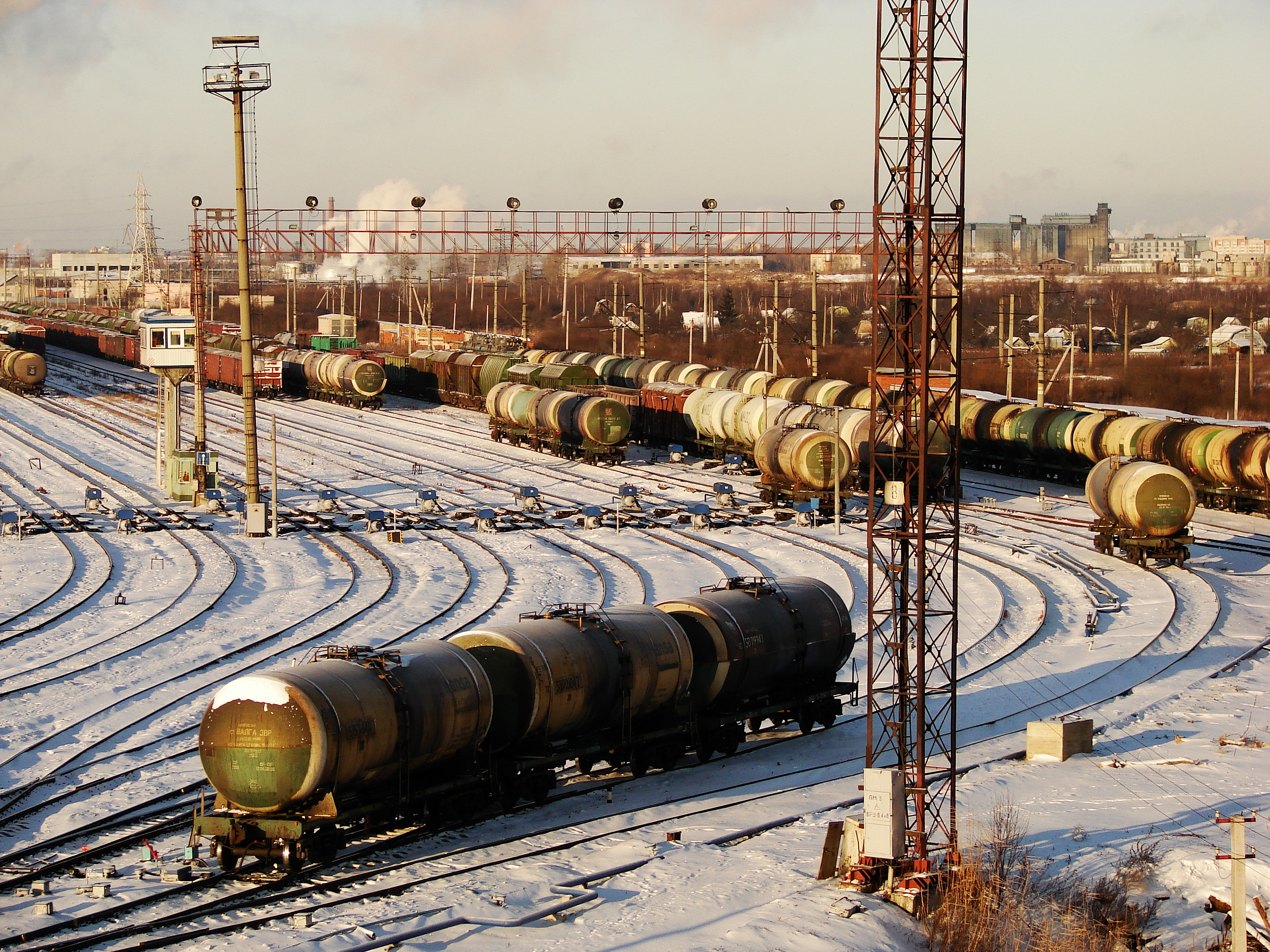 пять отцепов (цистерны) движутся в сортировочный парк